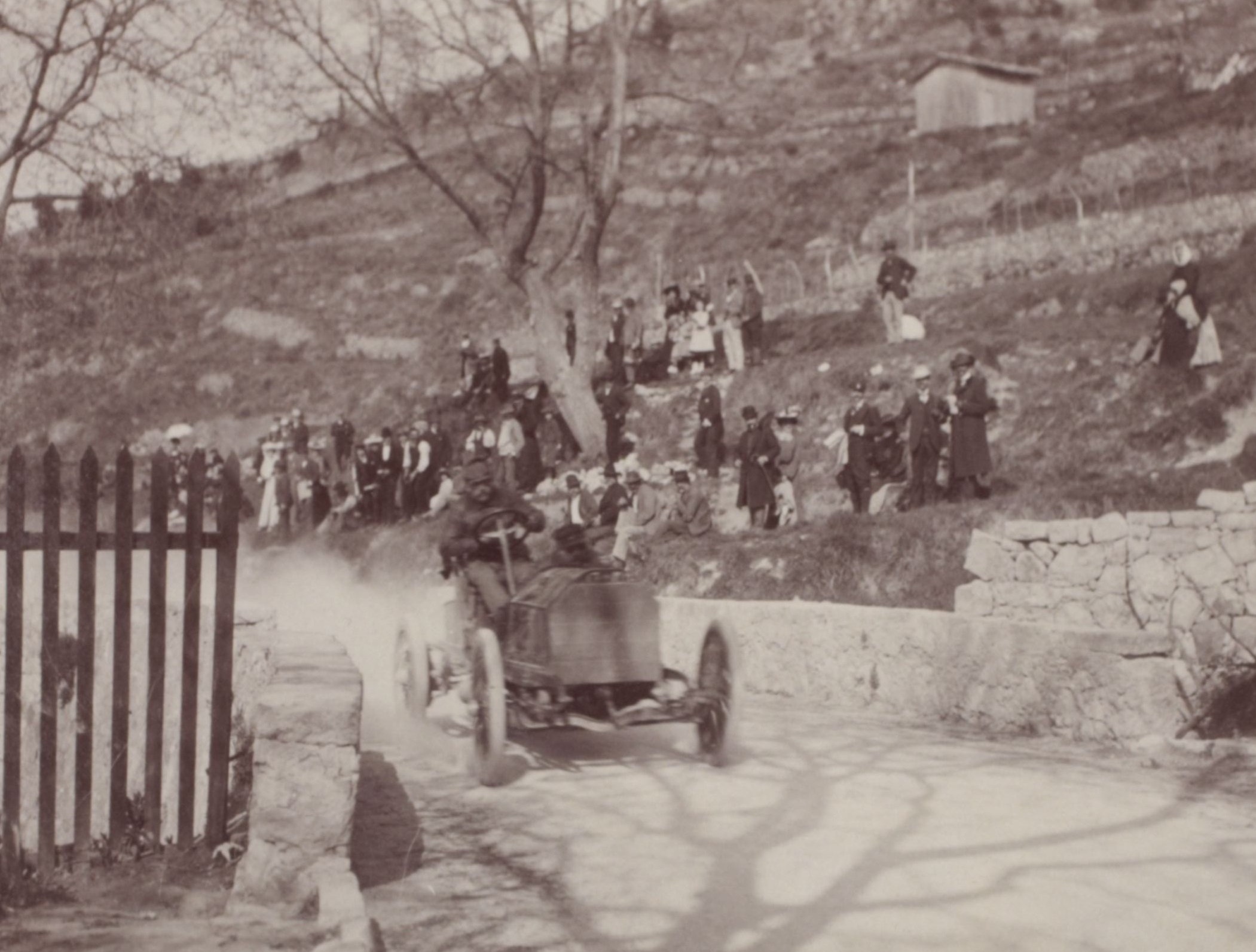 [Collection Jules Beau. Photographie sportive] : T. 20. Année 1903 / Jules Beau : F. 38v. [Quinzaine de Nice, Concours de tourisme], 1er avril 1903